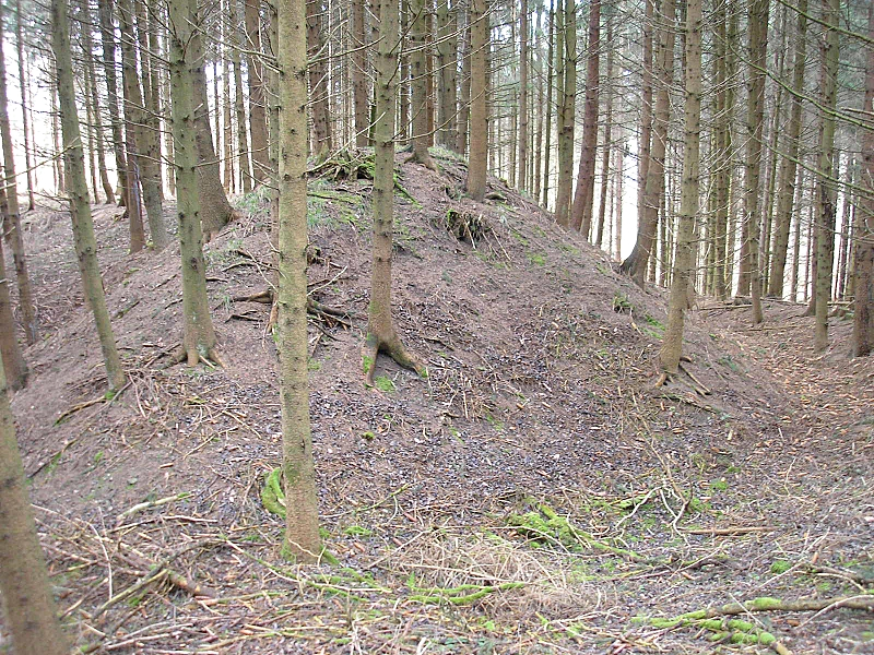 Frühmittelalterlicher Ringwall Walleshausen (Gemeinde Geltendorf, Landkreis Landsberg am Lech, Oberbayern). Der Wall der Vorburg von Osten. Eigene Aufnahme, Feb. 2008 / Early Middle Ages ringwork castle Walleshausen near Geltendorf (Upper Bavaria, Germany). The earthworks of the bailey, seen from the east. Own photo, Feb. 2008